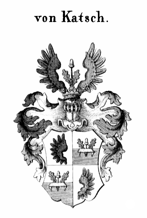 Wappen des Christoph v. Katsch aus dem Hallenser Pfännergeschlecht Katsch.